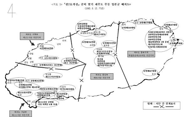 각 관할 구역을 설명